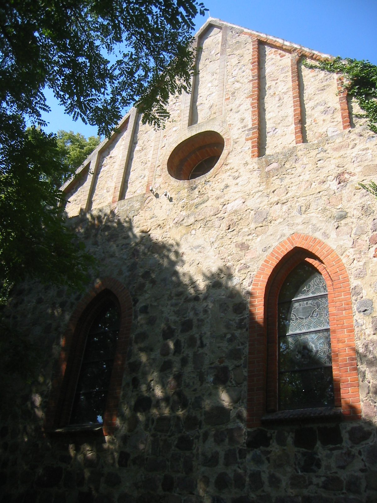 Ostseite der Dorfkirche Ringenwalde aus dem 13. Jahrhundert, heute Gemeinde Temmen-Ringenwalde, Uckermark (Brandenburg)